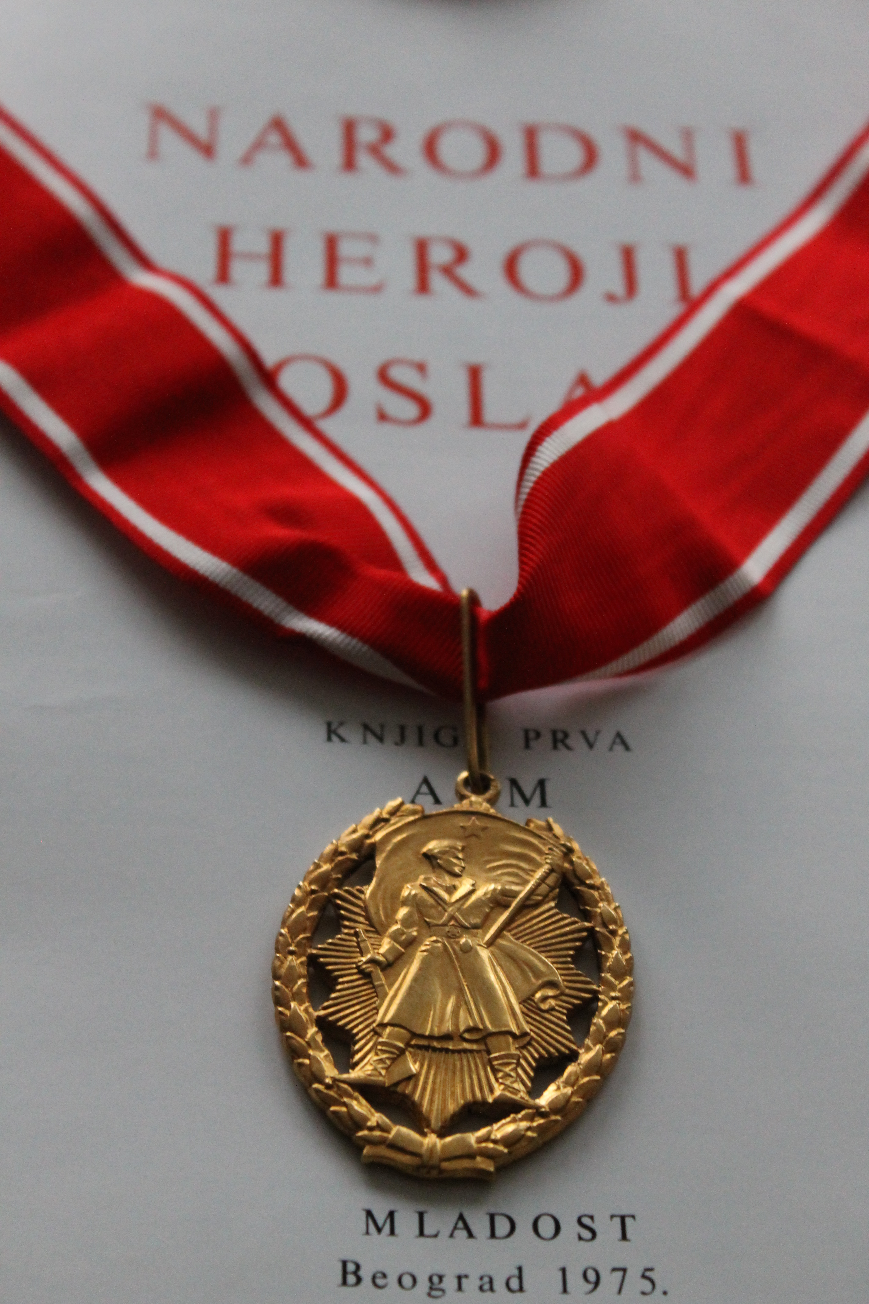 Орден народног хероја и књига Народни хероји Југославије